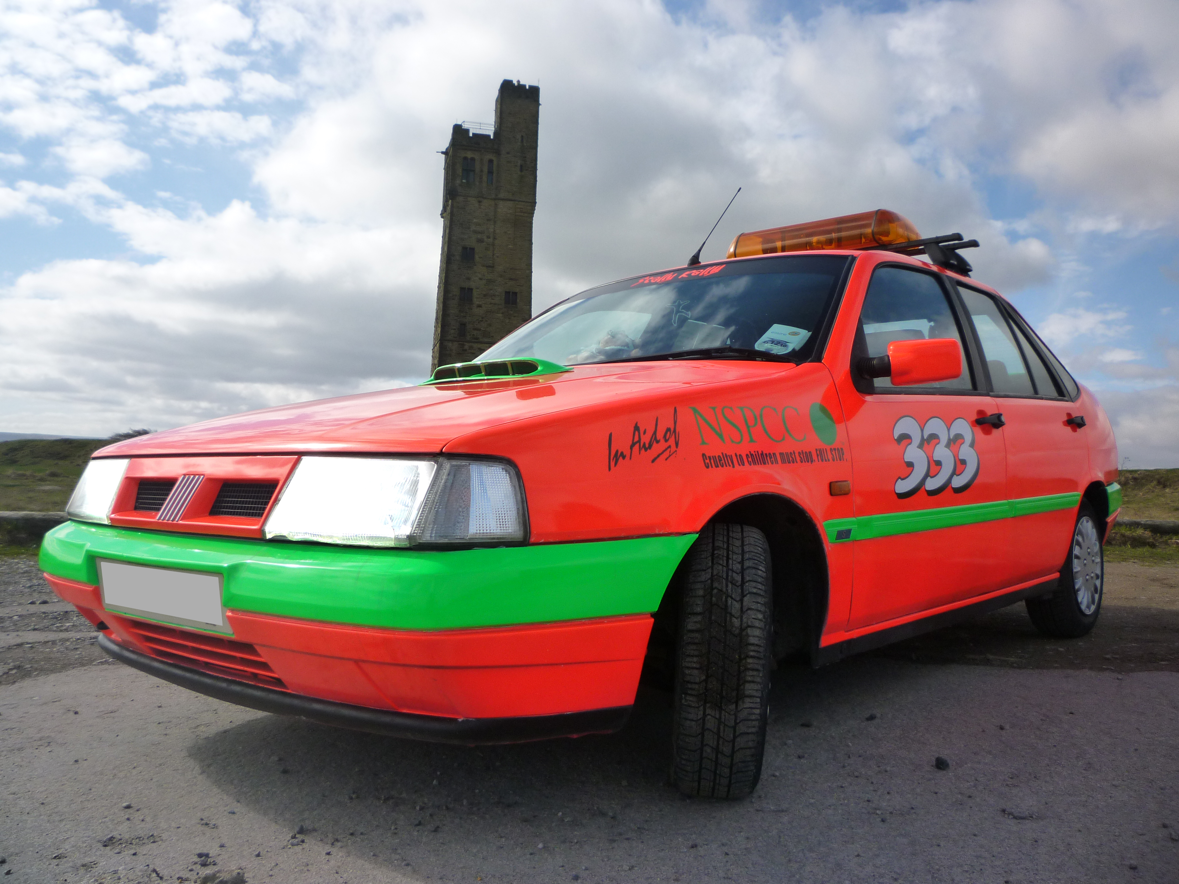 The '96 Fiat Tempra 1.6 m.p.i. used in Scally Rally Europe 2010